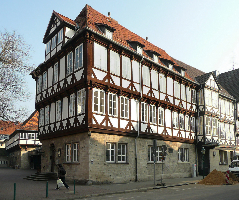 Das 1938 durch Wolfram von Erffa umgesetzte Spittahaus in Hannover unter der Adresse Burgstrasse 23 ...